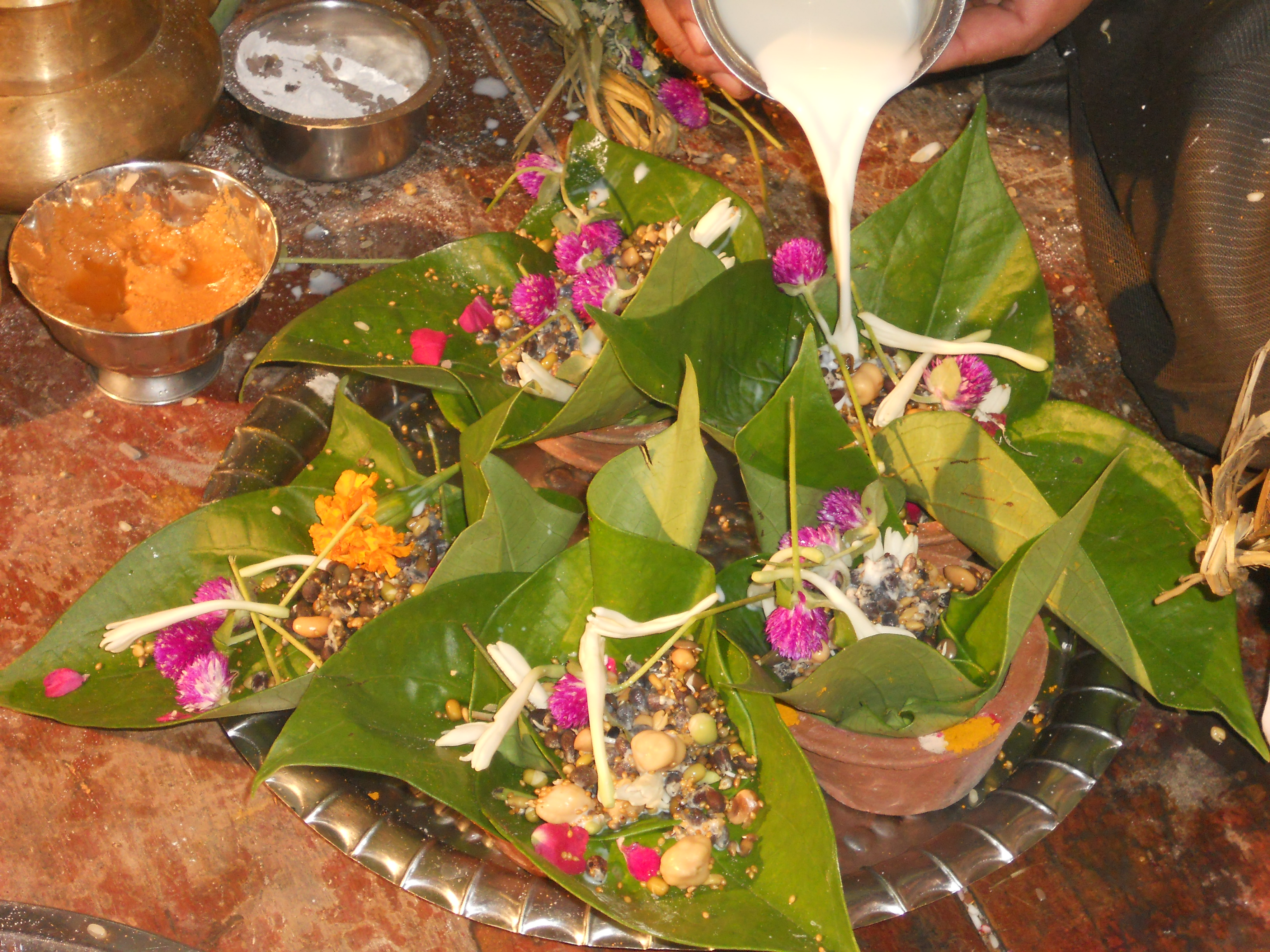 முளைப்பாலிகை போடல்